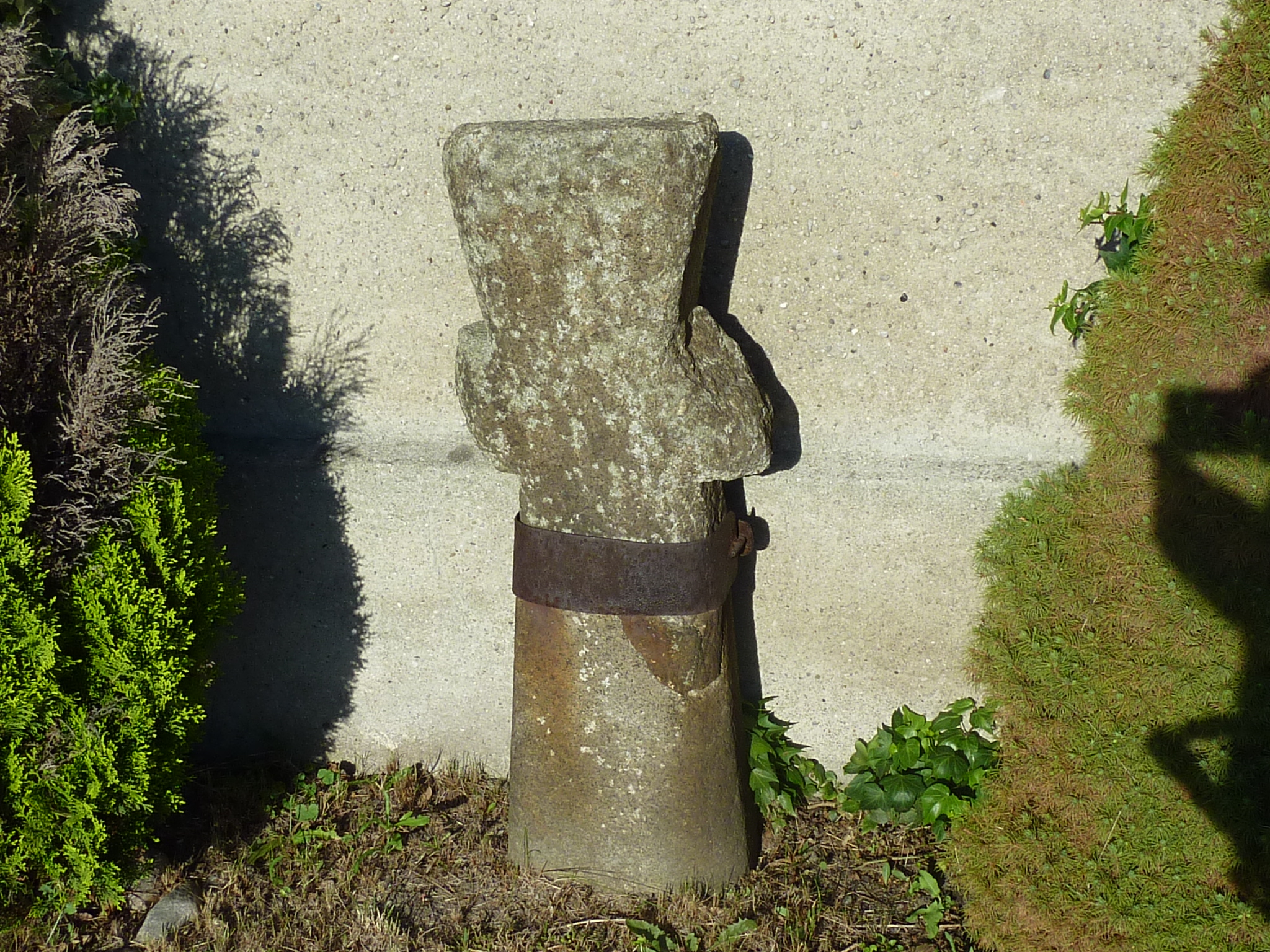 Steinkreuz am Gasthof in Geierswalde, Sachsen